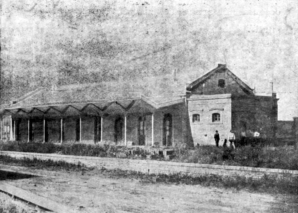 Coronel Suárez station of Rosario and Puerto Belgrano Railway (in